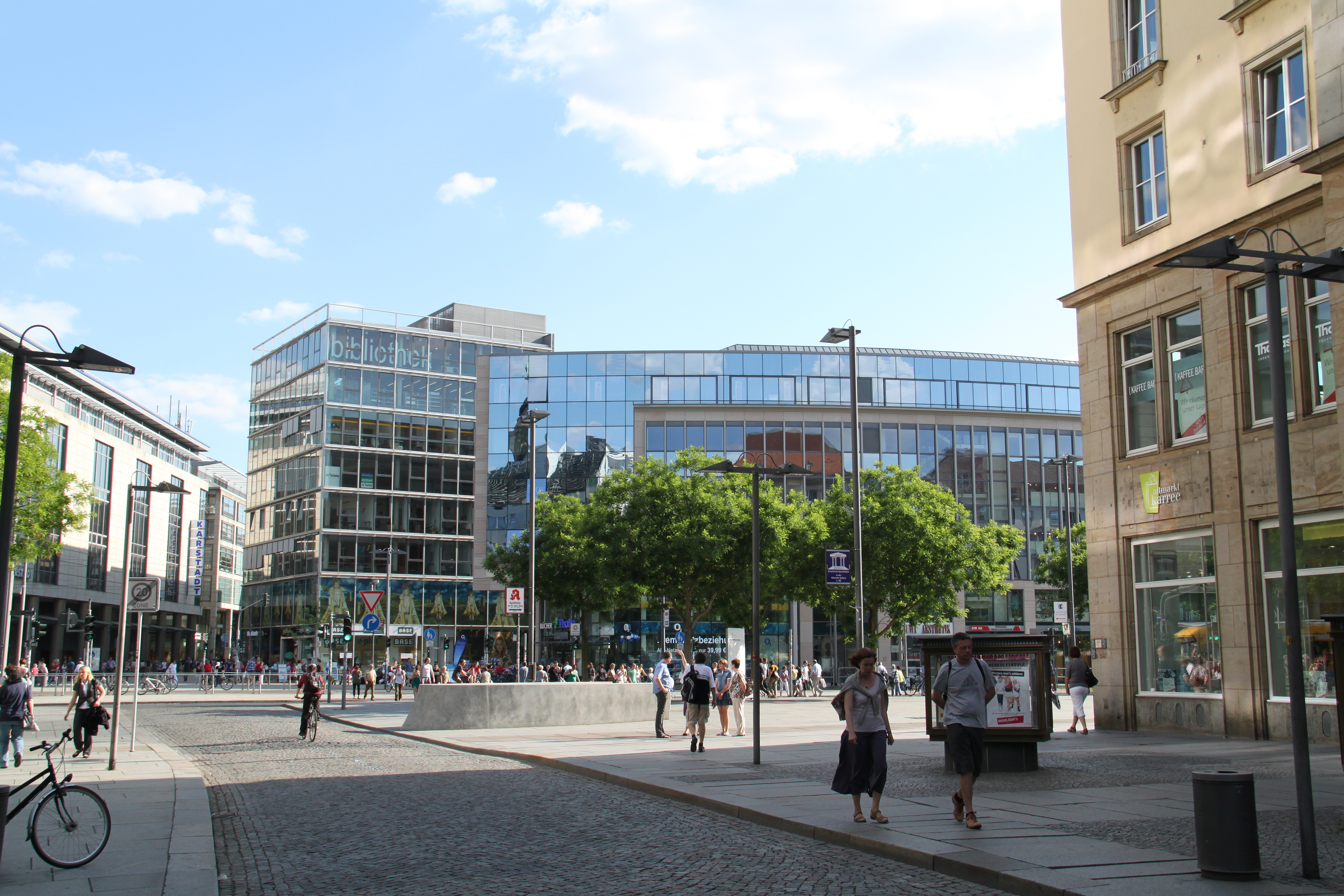 Impressionen Dresden